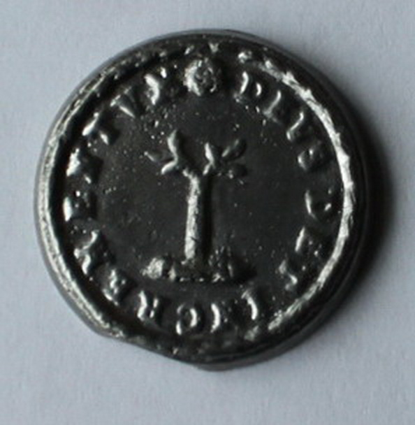 Abendmahlsmarke der französisch-reformierten Gemeinde in Leipzig. Abgehauener Baumstamm, der frische Zweige treibt. Umschrift: DEVS DET INCREMENTUM (Gott gebe Wachstum)